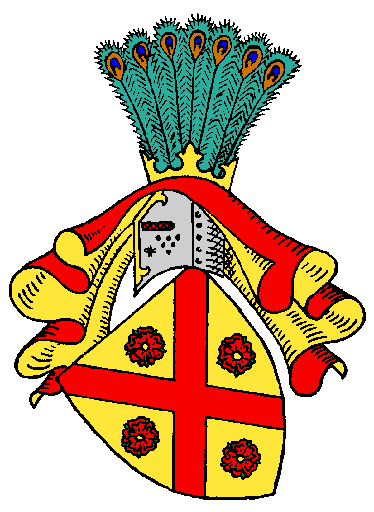 Stammwappen der Herren von Gützkow